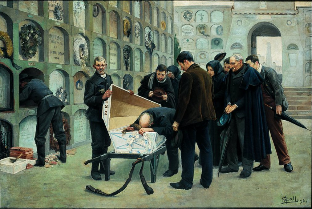 Coll i Pi hizo varias variantes, al menos tres de este funeral: la de este tílulo, la expuesta en el Salón Nacional de Bellas Artes de Chile de 1939 (aunque está fechada también a fines de los años 1890) con el título de Último adiós pero sin el personaje que levanta su sombrero, y El momento más cruel, que se diferencia por no tener al hombre que pareciera abrazar al muerto en el ataúd abierto despidiéndose de él.